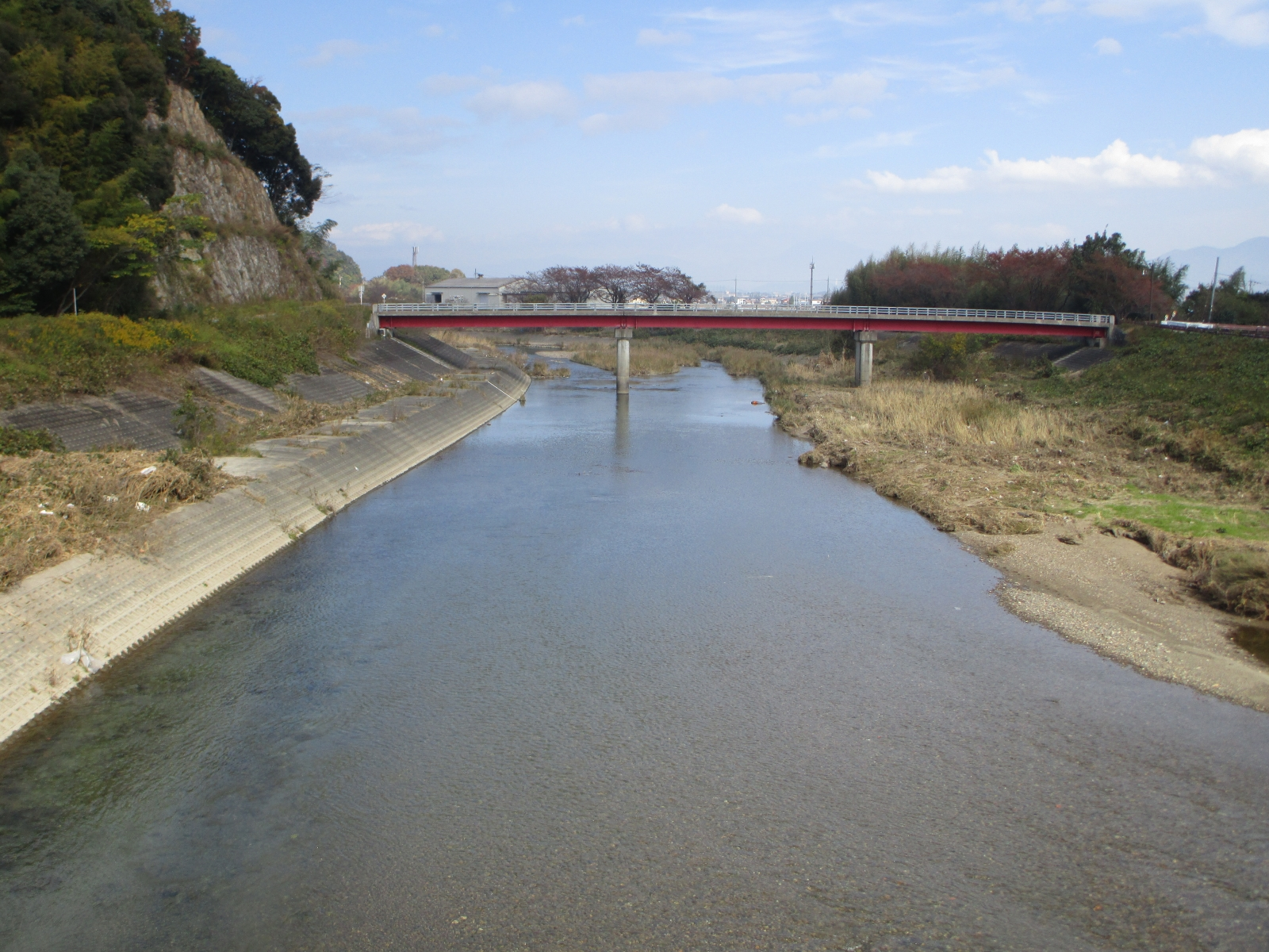 宇曽川（滋賀県彦根市、新大山橋より撮影）